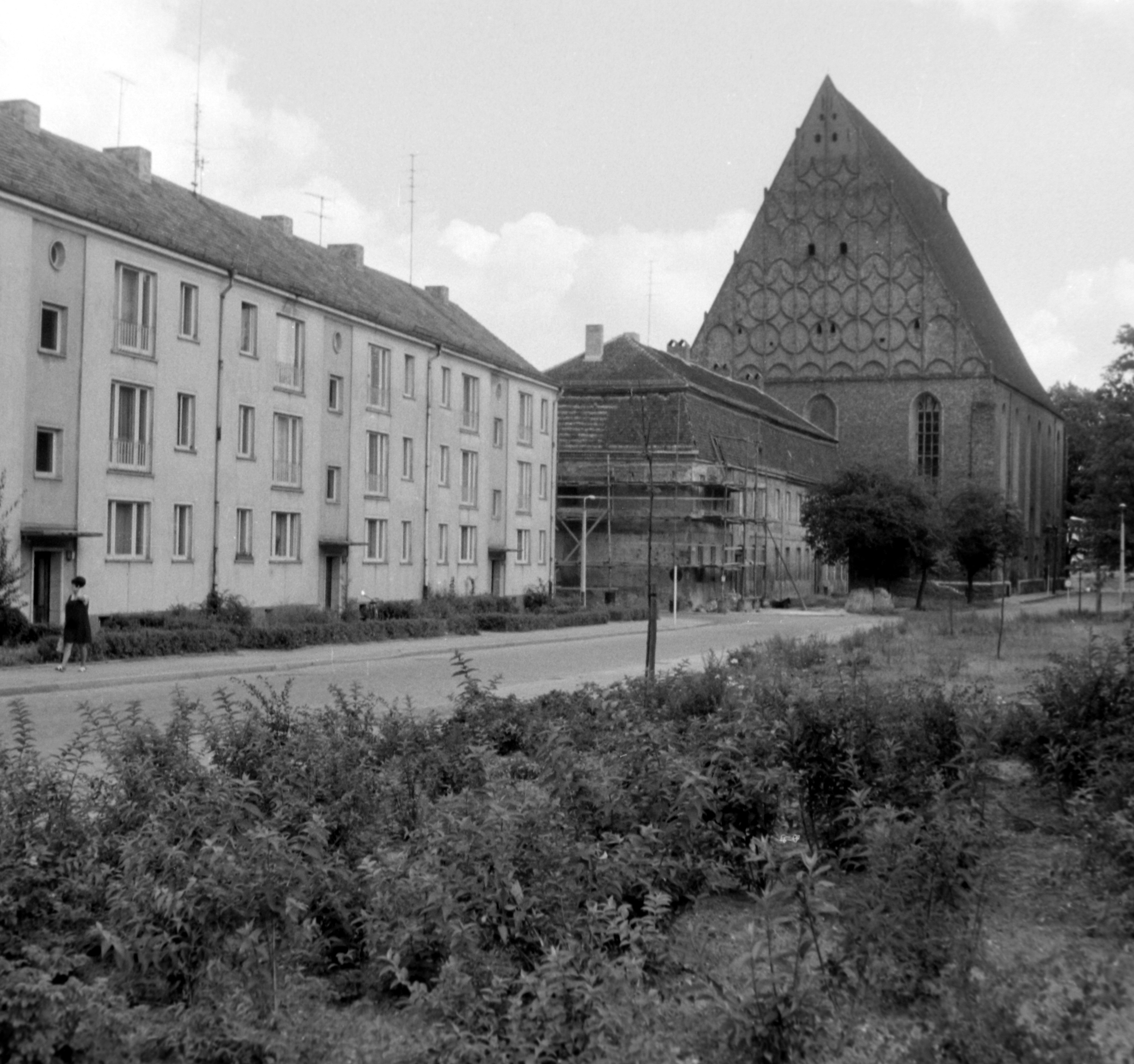 Frankfurt (Oder), Brandenburg, Deutschland 1967